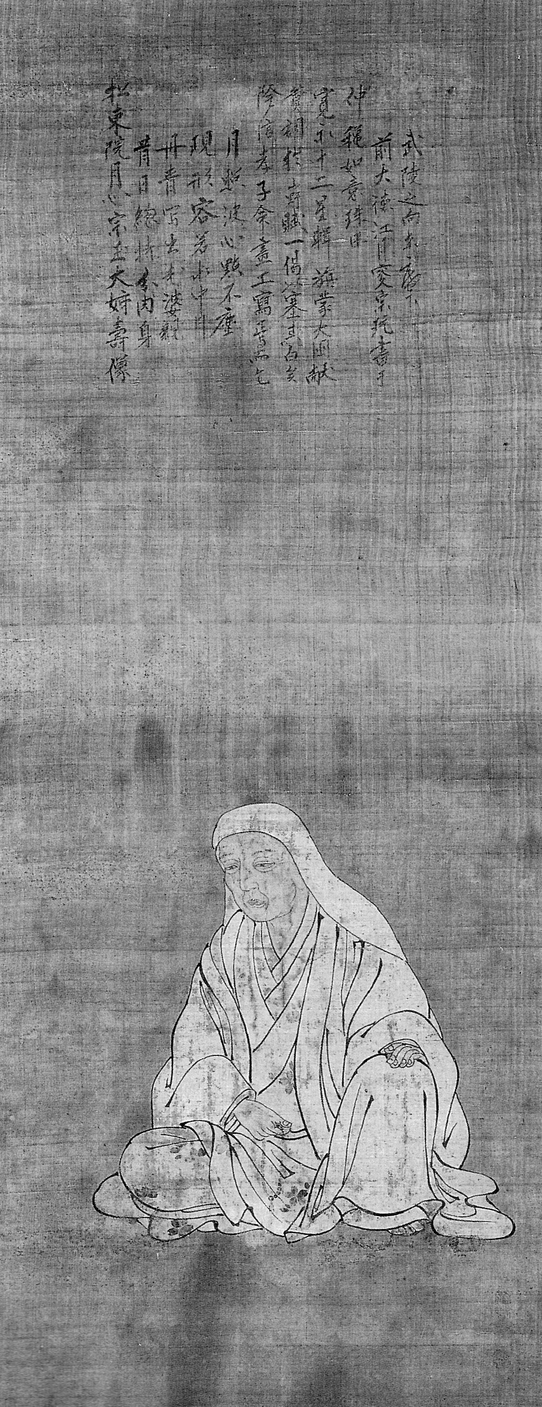 松東院(松浦メンシヤ、松浦久信の室、大村純忠女)の肖像。